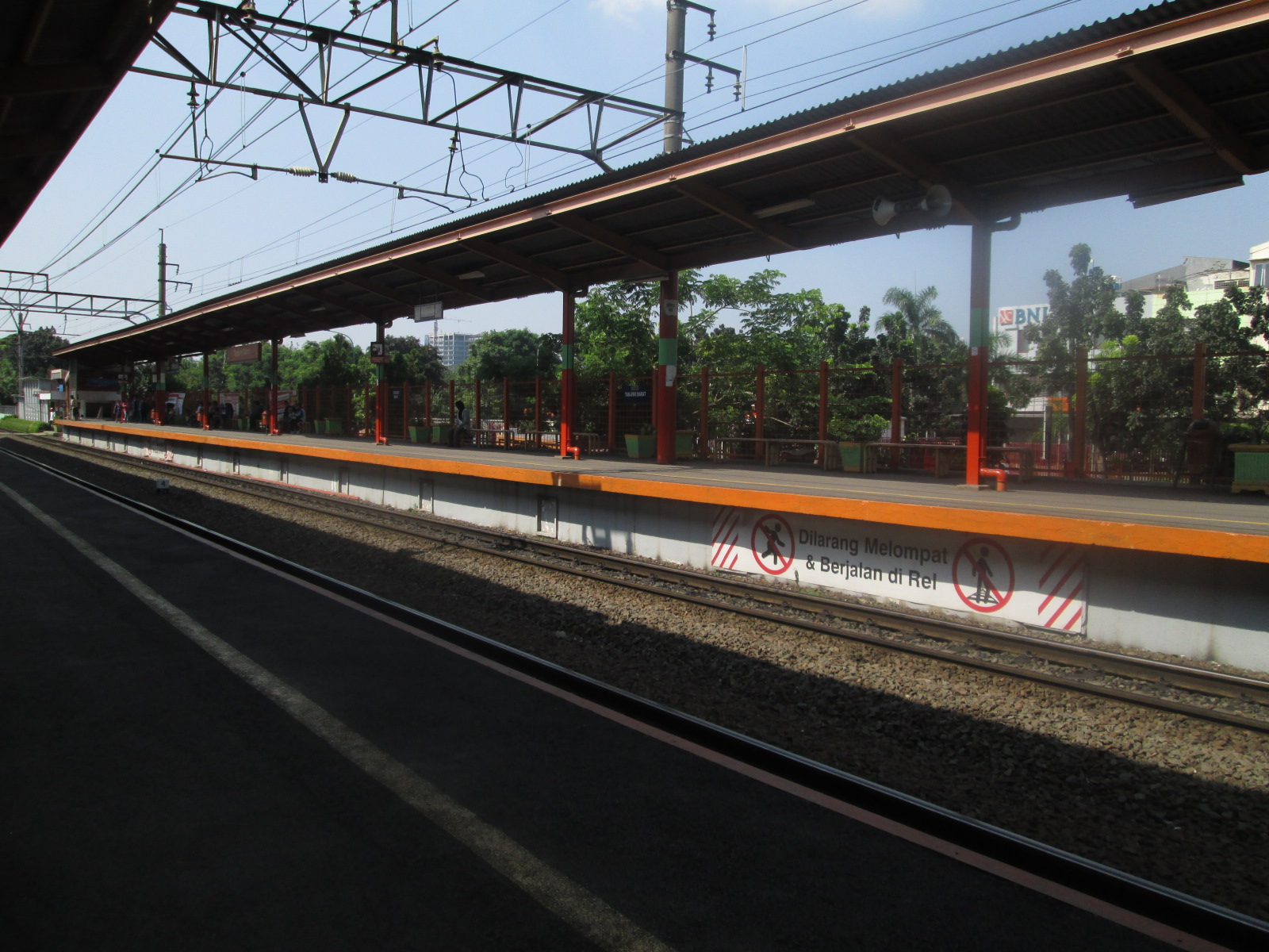 Stasiun Tanjung Barat